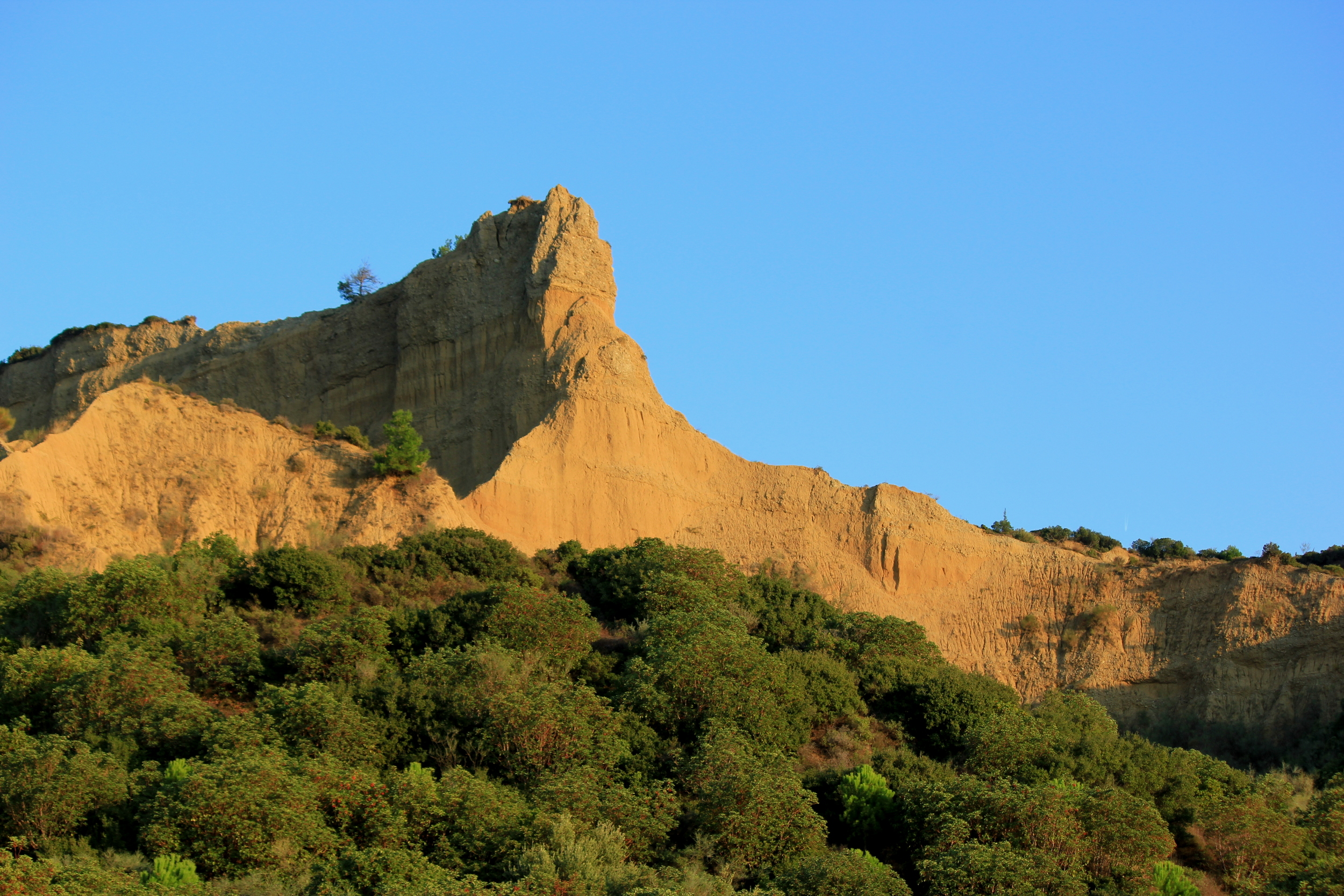 Die sogenannte "Sphinx" in der ANZAC-Bucht auf der Halbinsel Gallipoli, Schauplatz der Schlacht von Gallipoli im Ersten Weltkrieg.